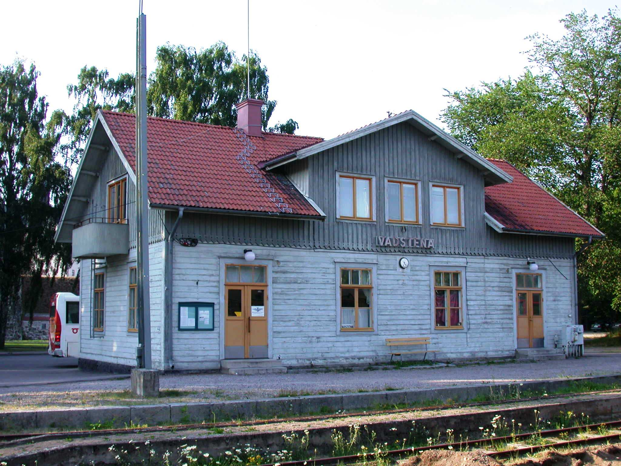 Vadstena railway station (now Wadstena-Fågelsta Järnväg), Sweden. Photo by Riggwelter, July 20, 2006.